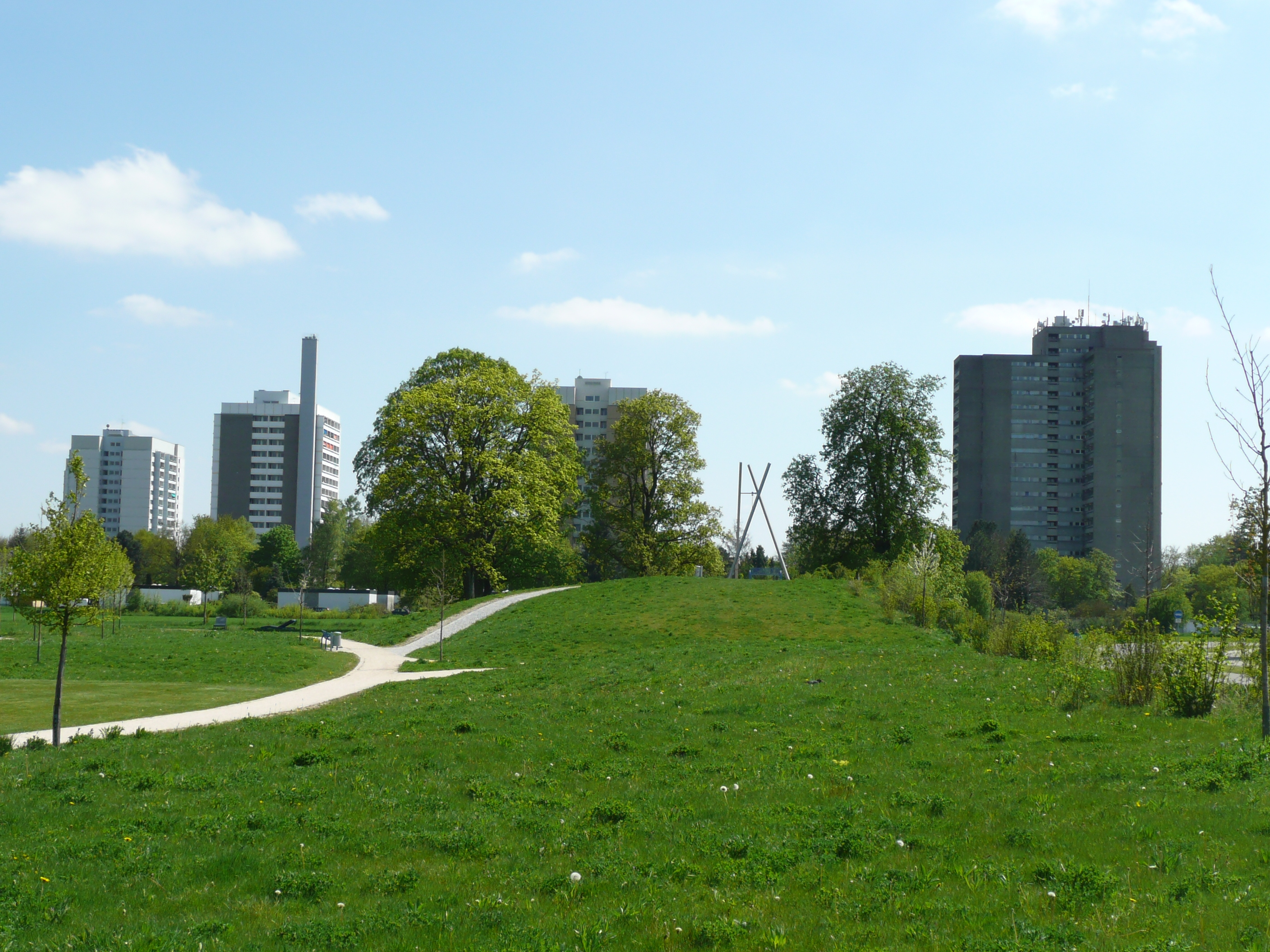 Hochhausilhouette vom Wiley aus gesehen